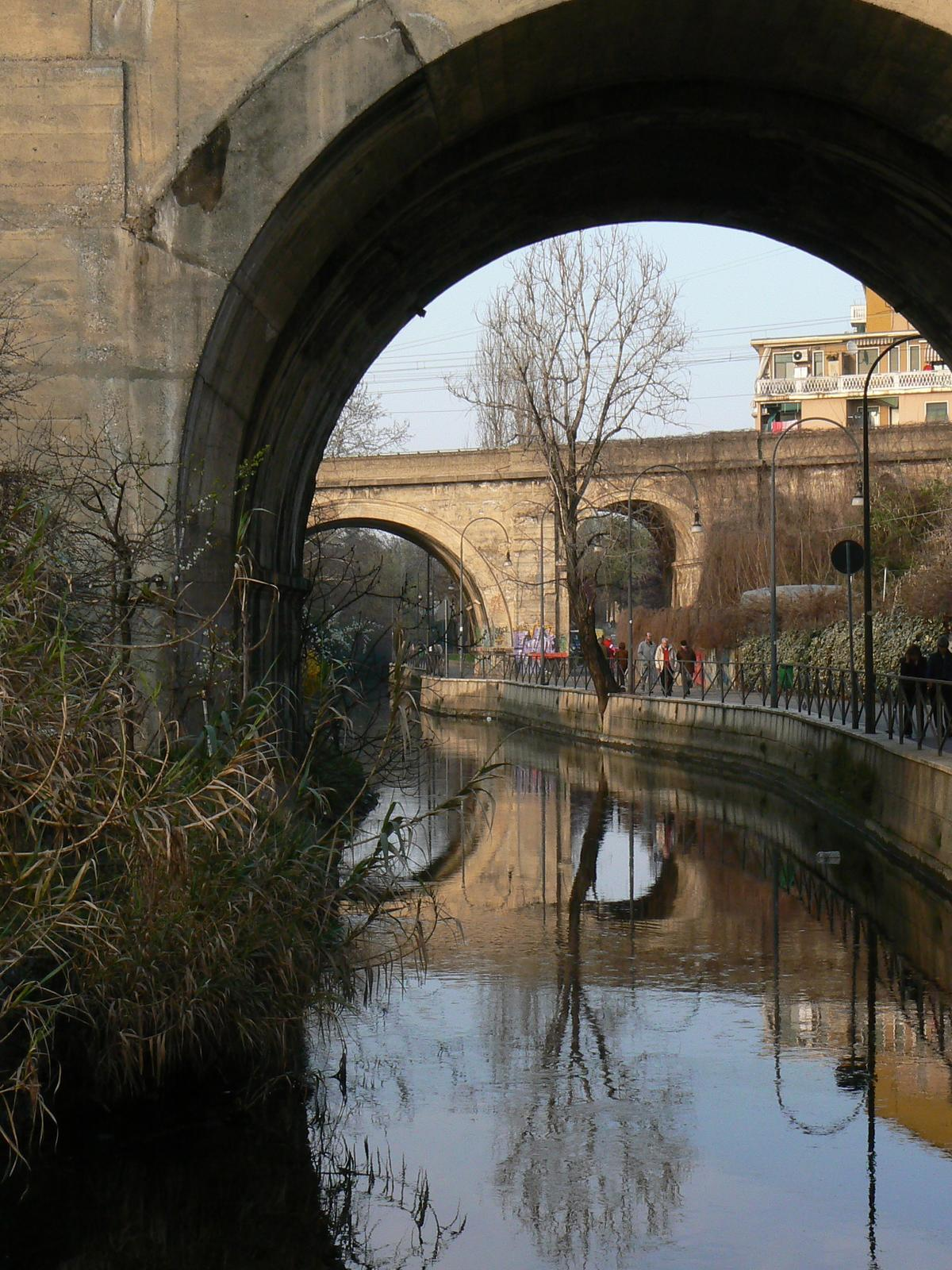 Il Naviglio Martesana a Milano, presso i ponti ferroviari della stazione centrale